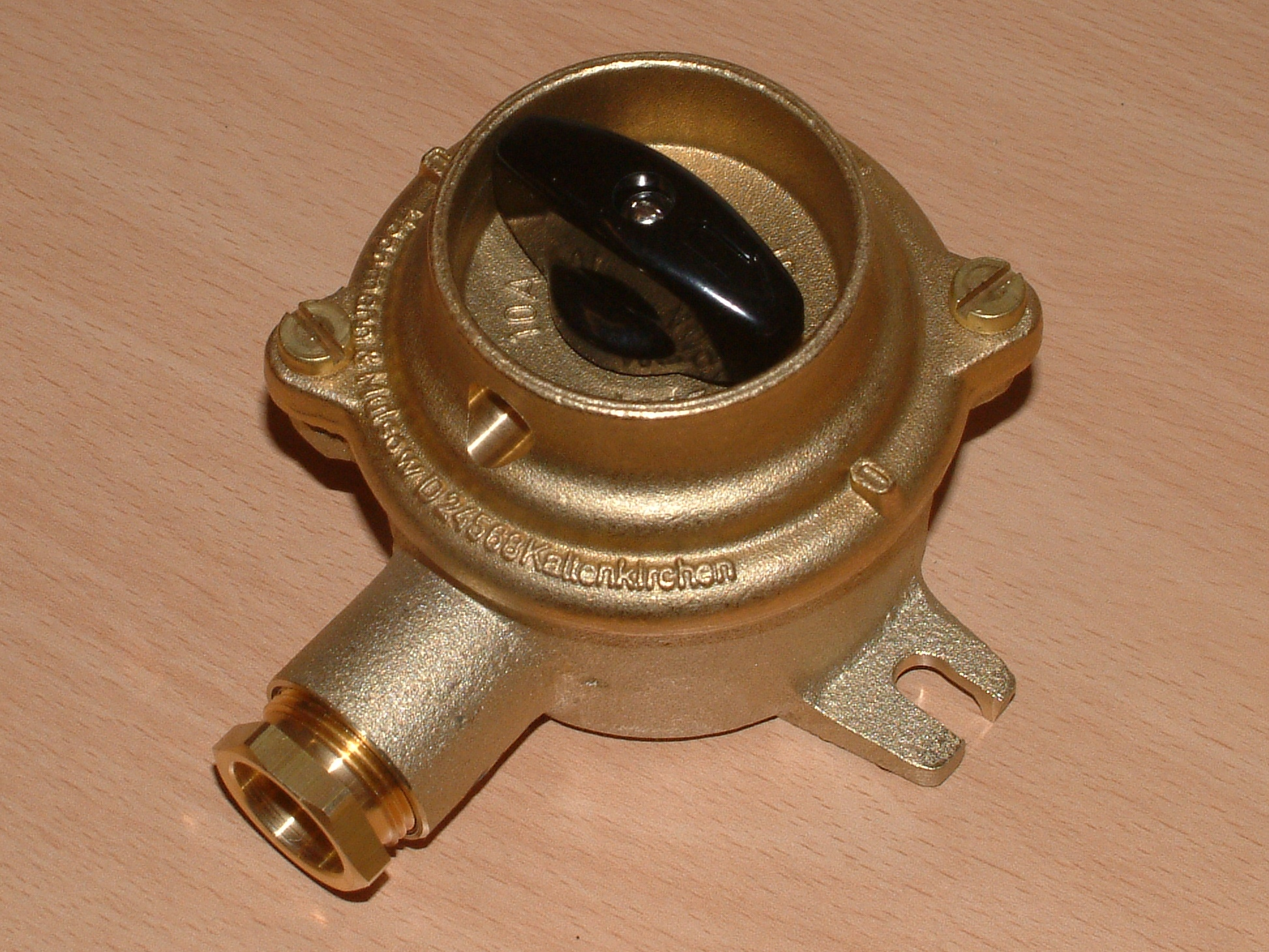 Europort 2009